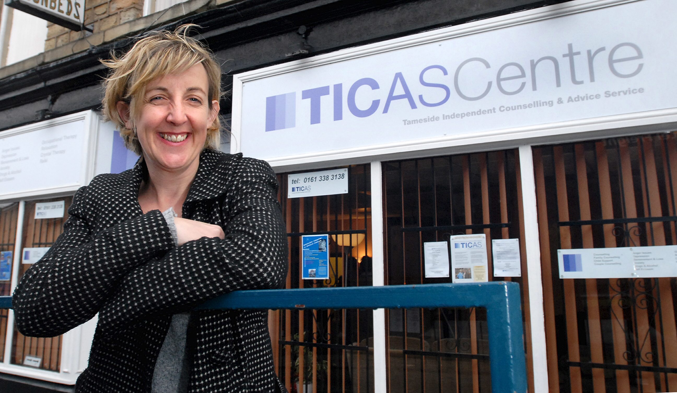 Julie Hesmondhalgh